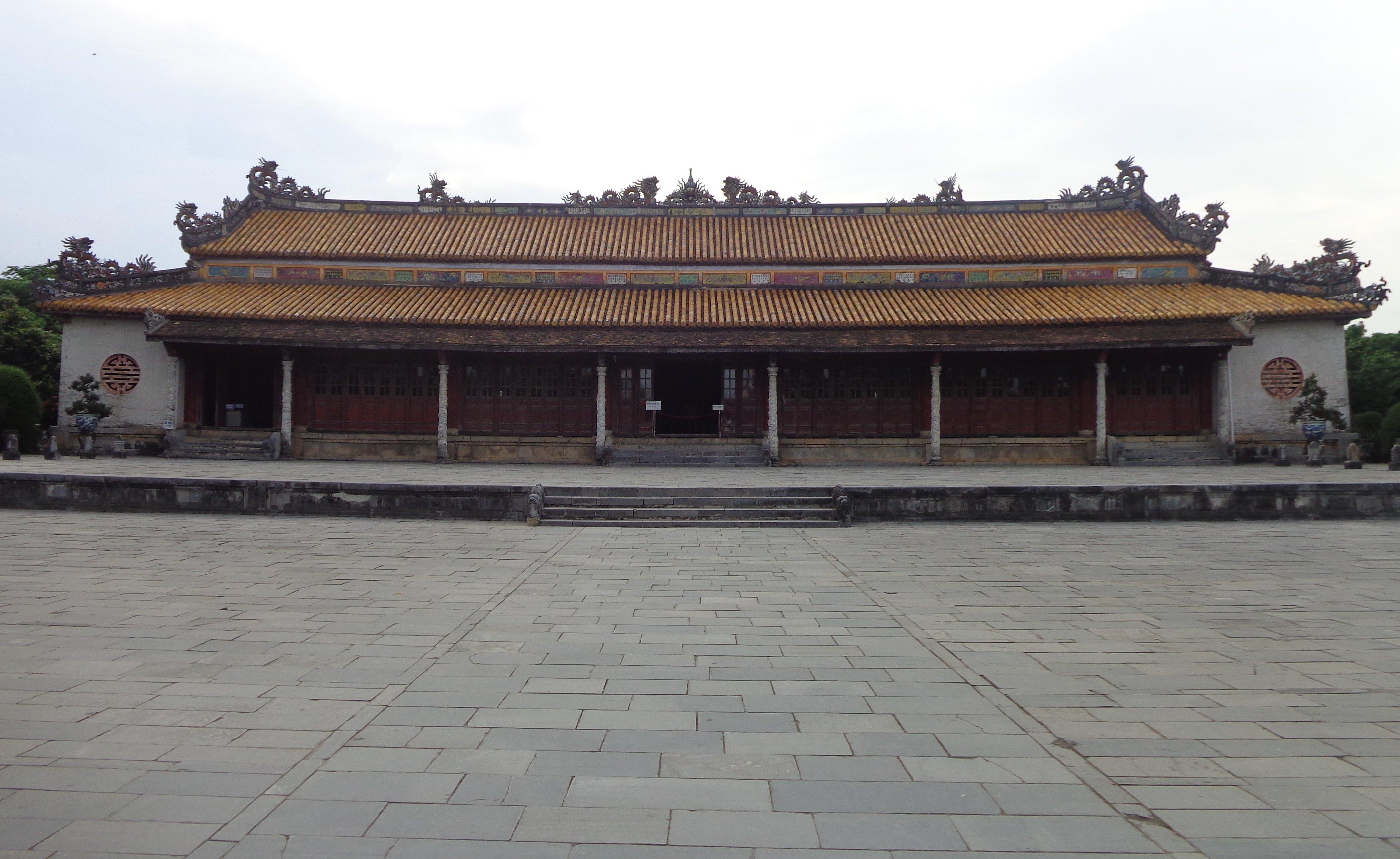 Điện Thái Hòa và sân Đại Triều Nghi trong Hoàng thành Huế.